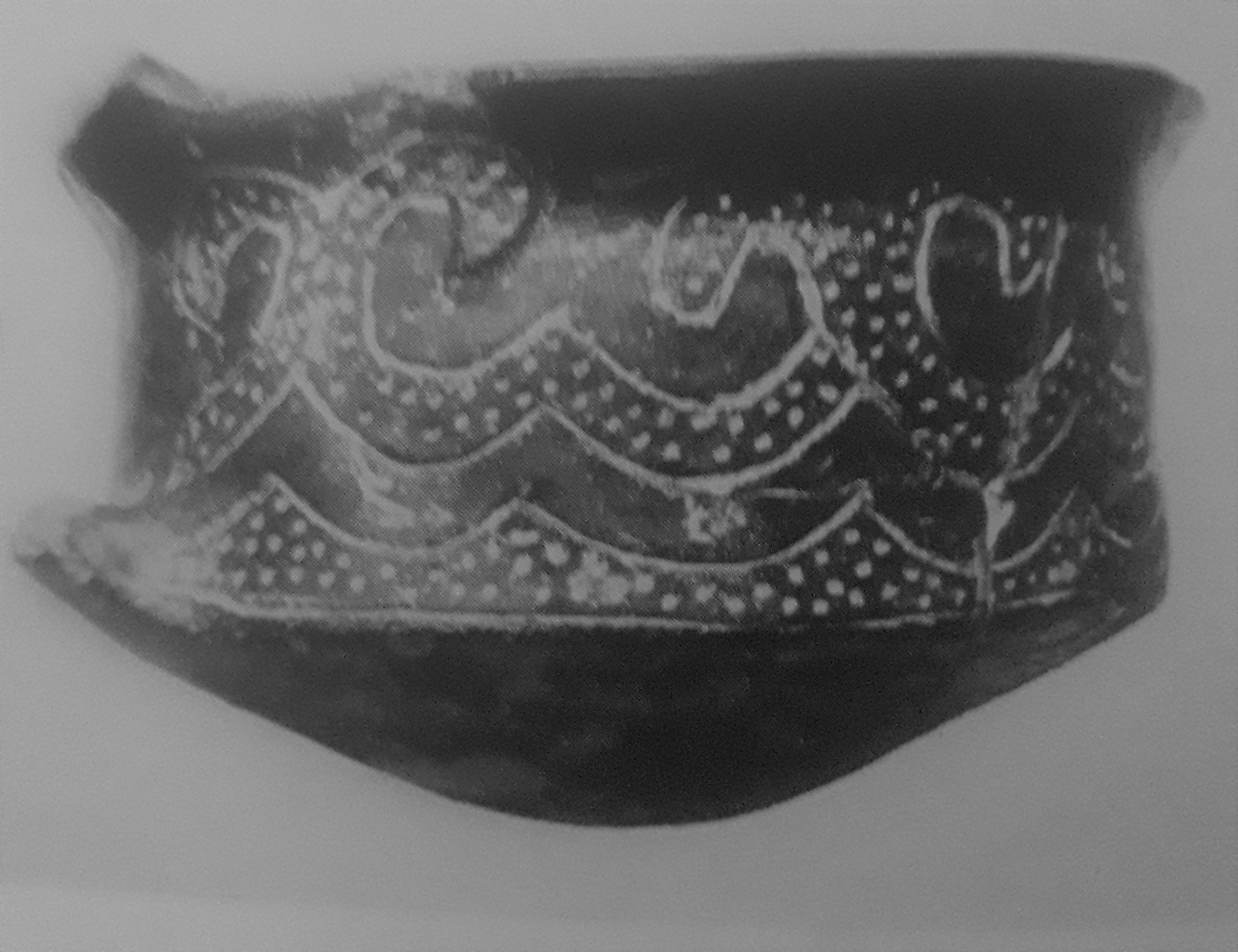 Ceramica appenninica